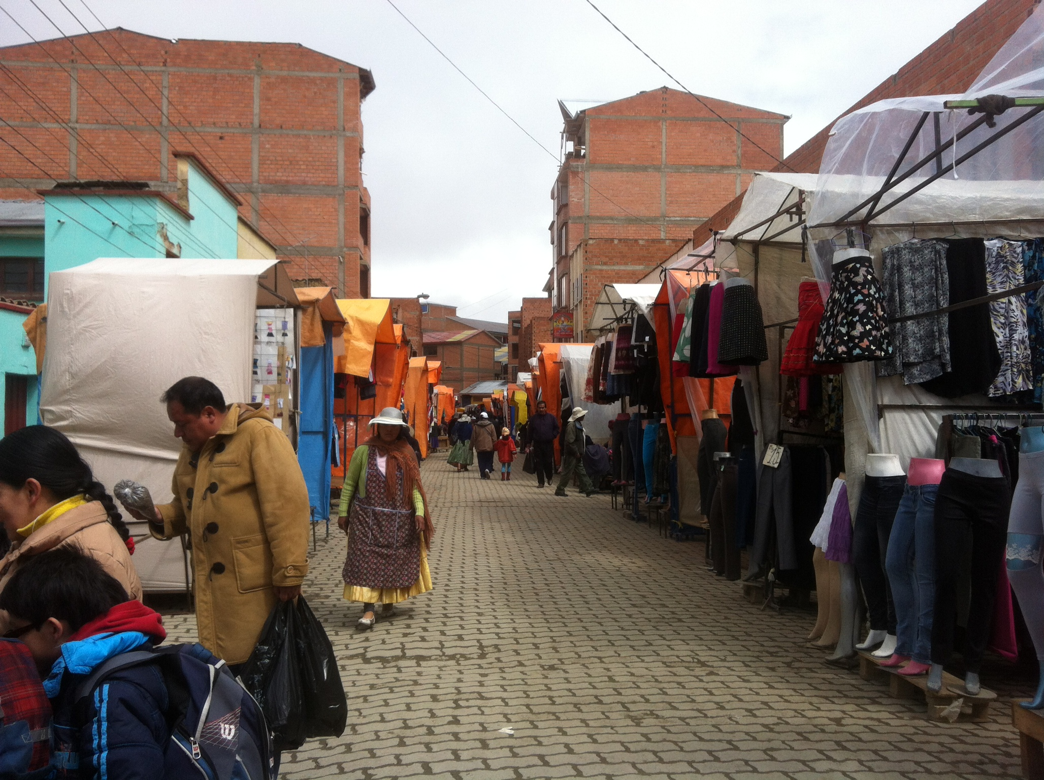 mercado/feria 16 de Julio / El Alto